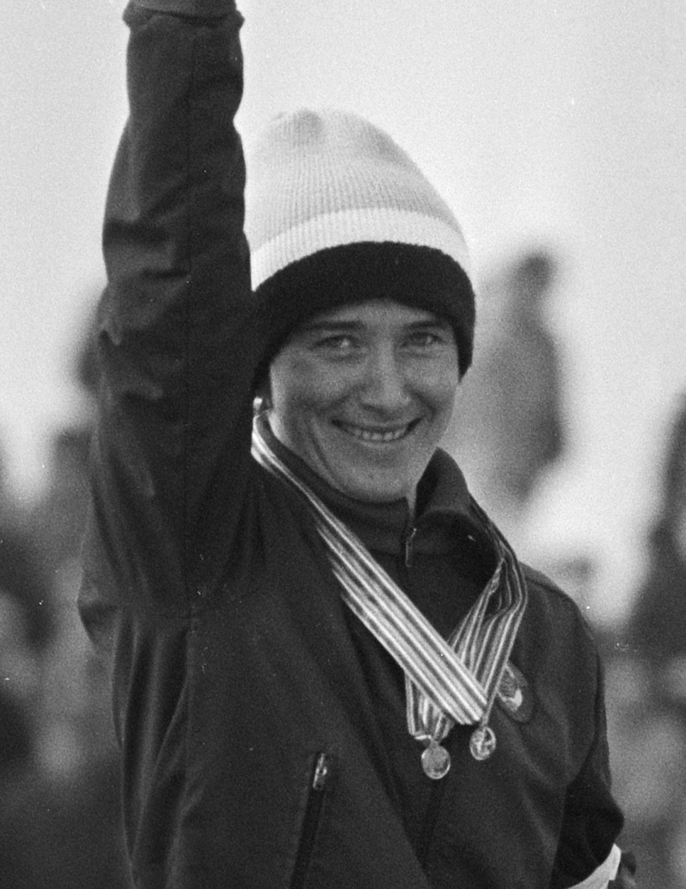 Natalya Petrusyova. WK Sprint schaatsen in Alkmaar. .